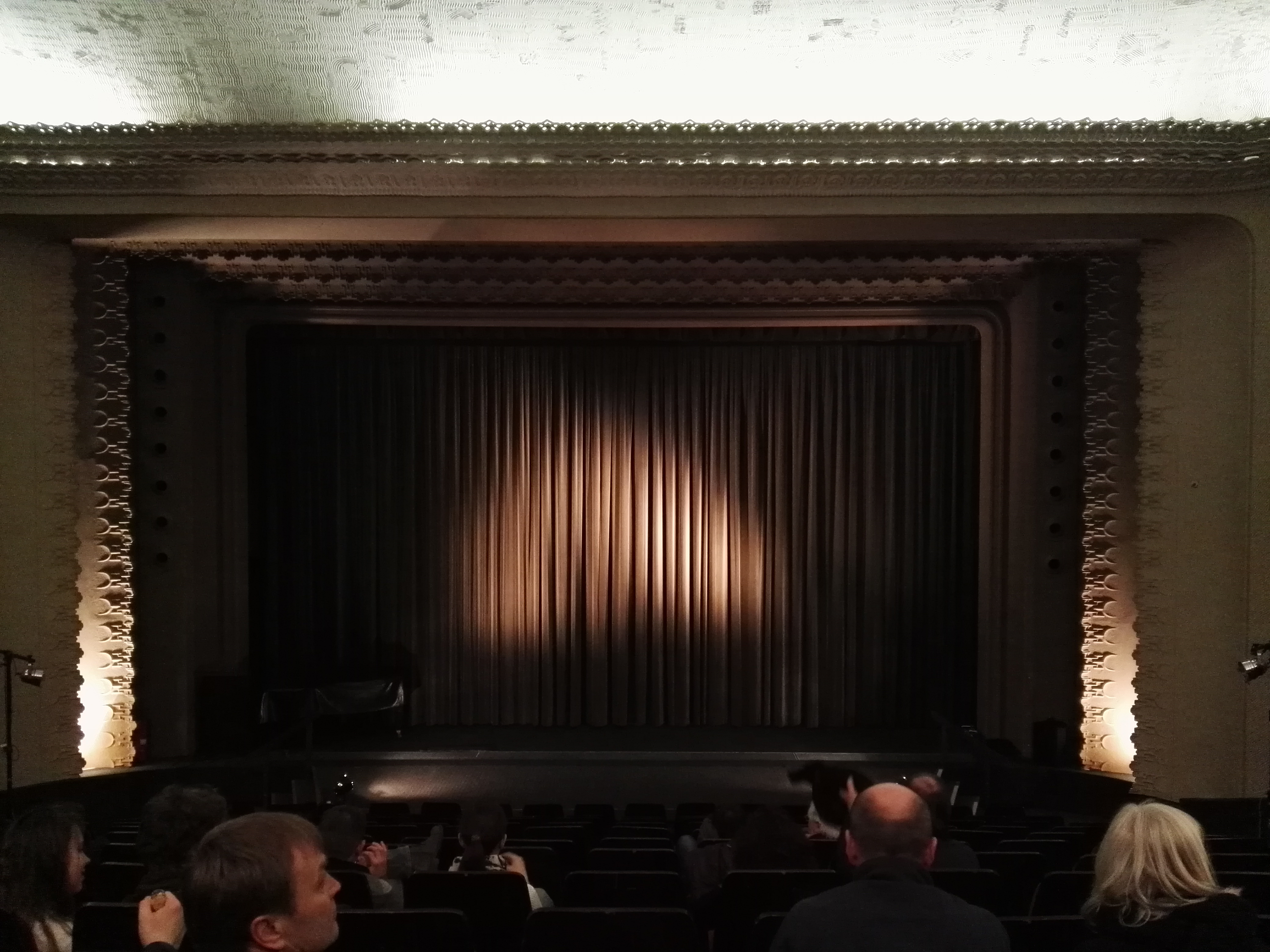 Kinosaal Sergio Leone im Kino Schauburg in Dresden